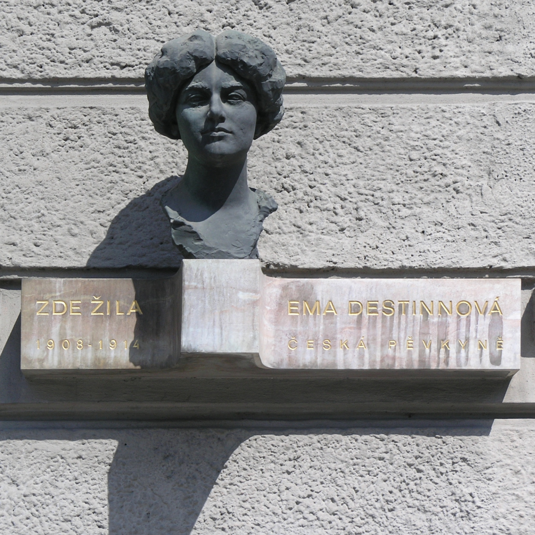 Praha, Malostranské náměstí - Ema Destinová (busta od sochaře Jana Simoty)